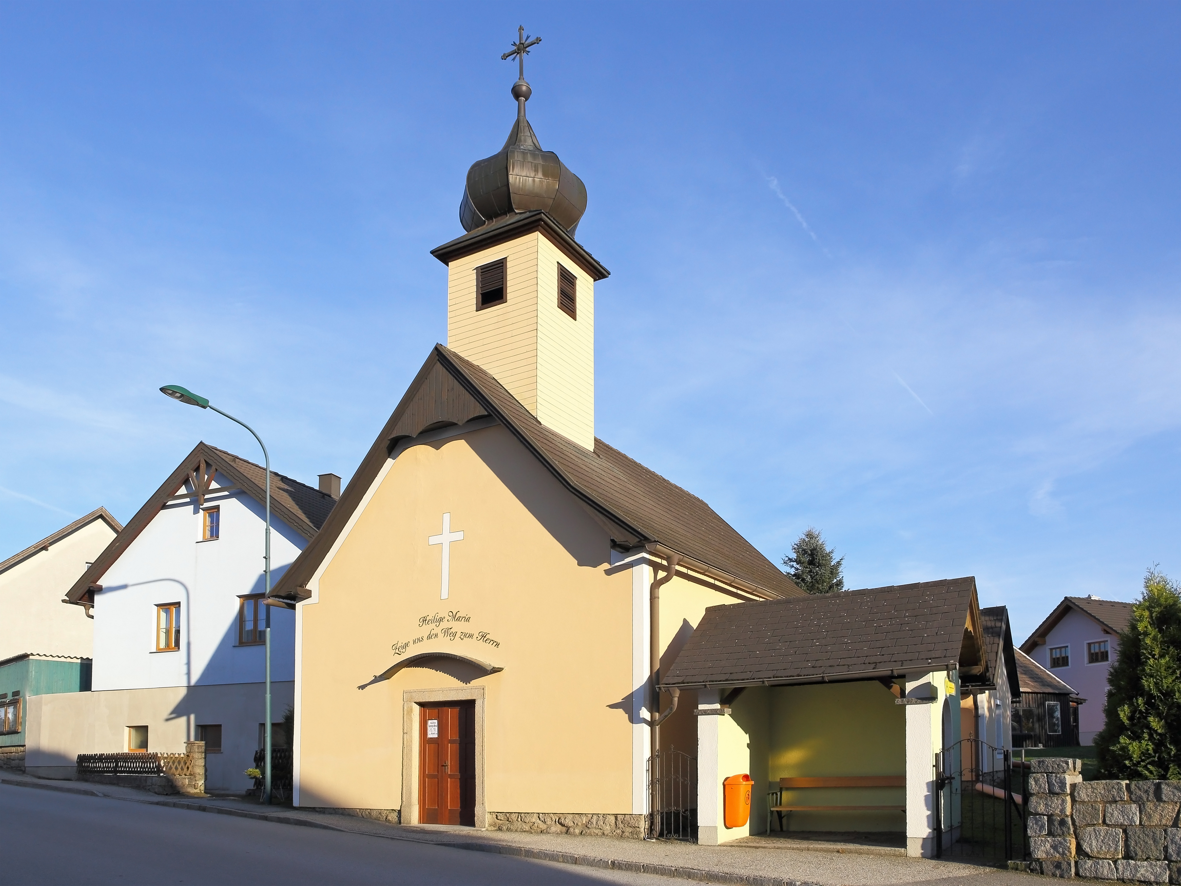 Die Ortskapelle Zur Himmelfahrt Unserer Lieben Frau in Amaliendorf wurde 1818 errichtet.